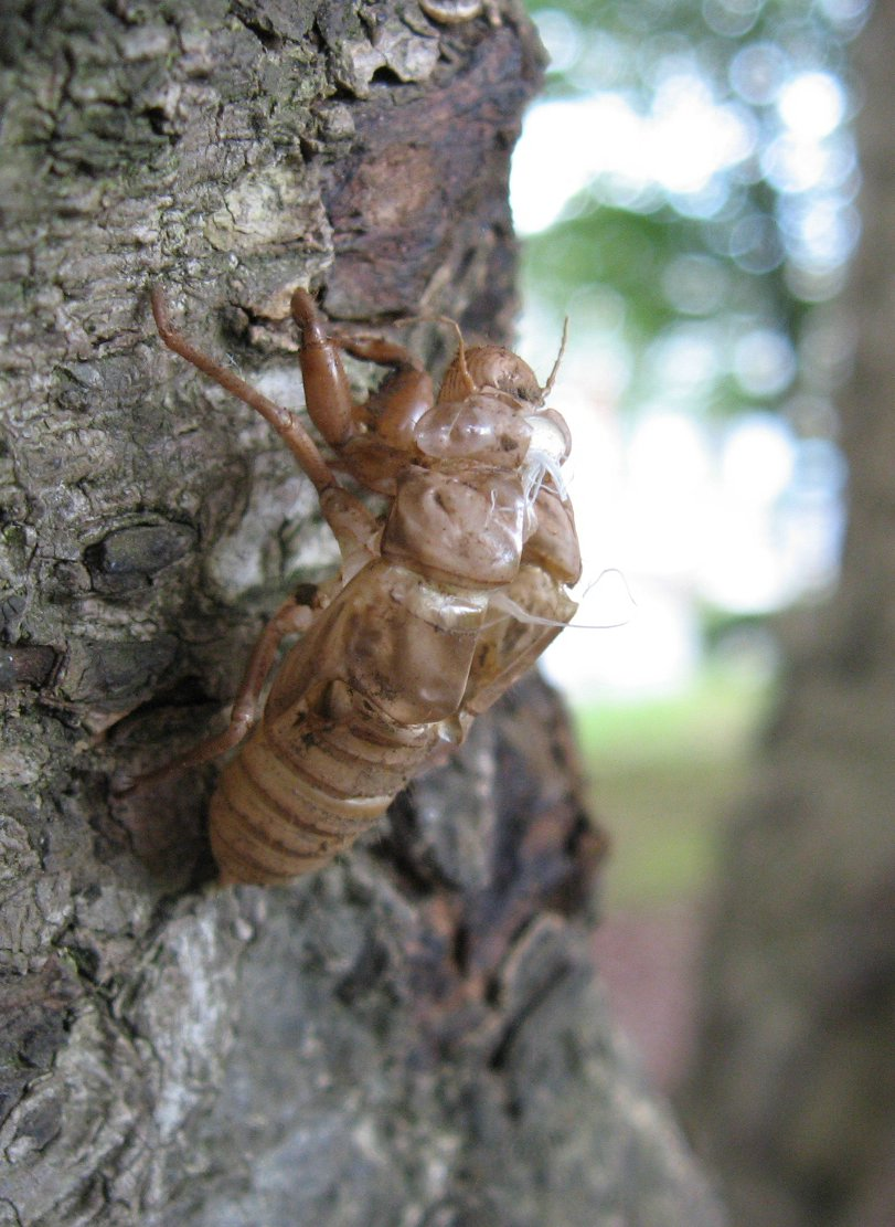 ツクツクボウシ (Meimuna opalifera) のぬけがら